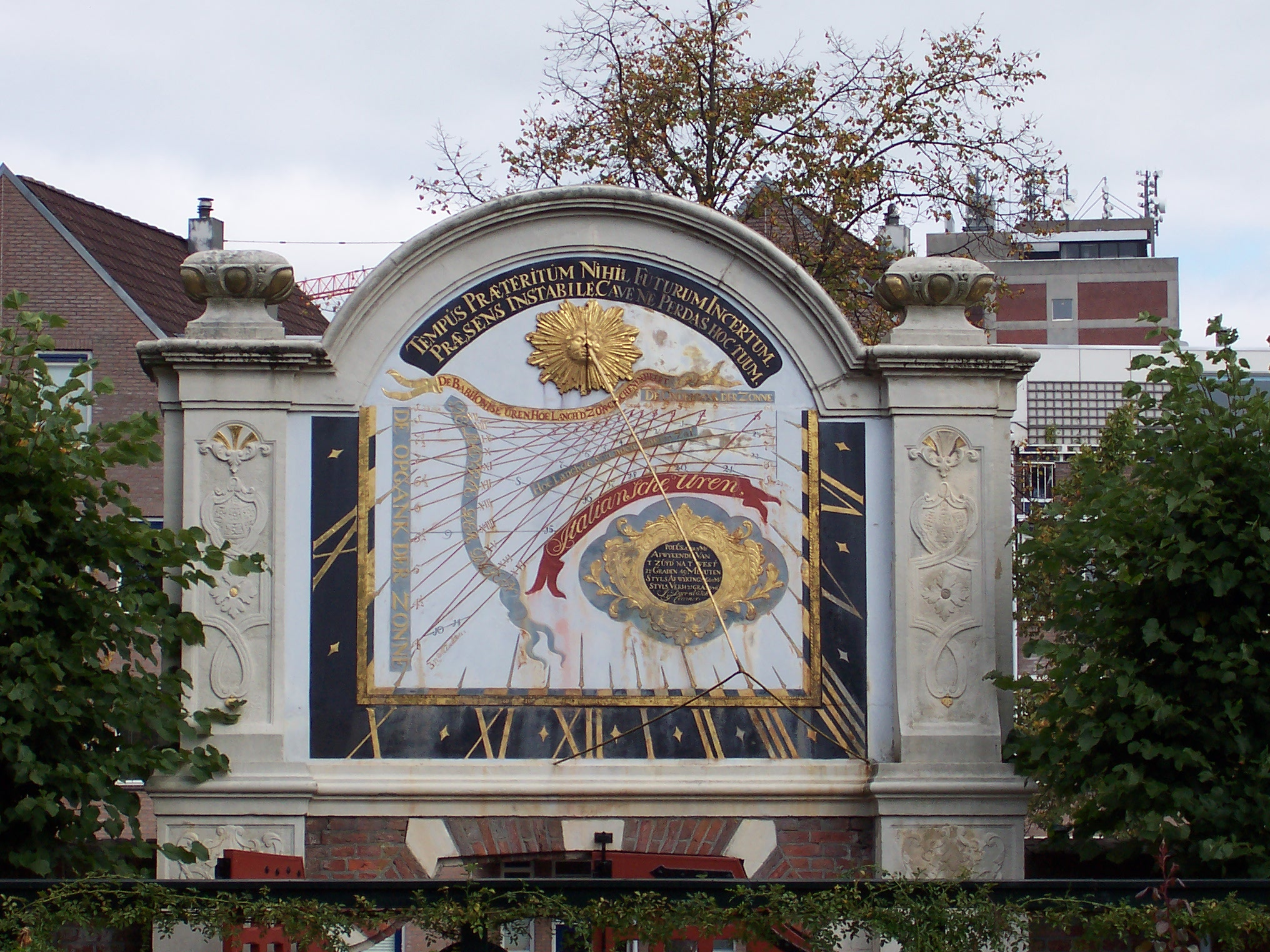 Groningen, de zonnewijzer in de Prinsentuin